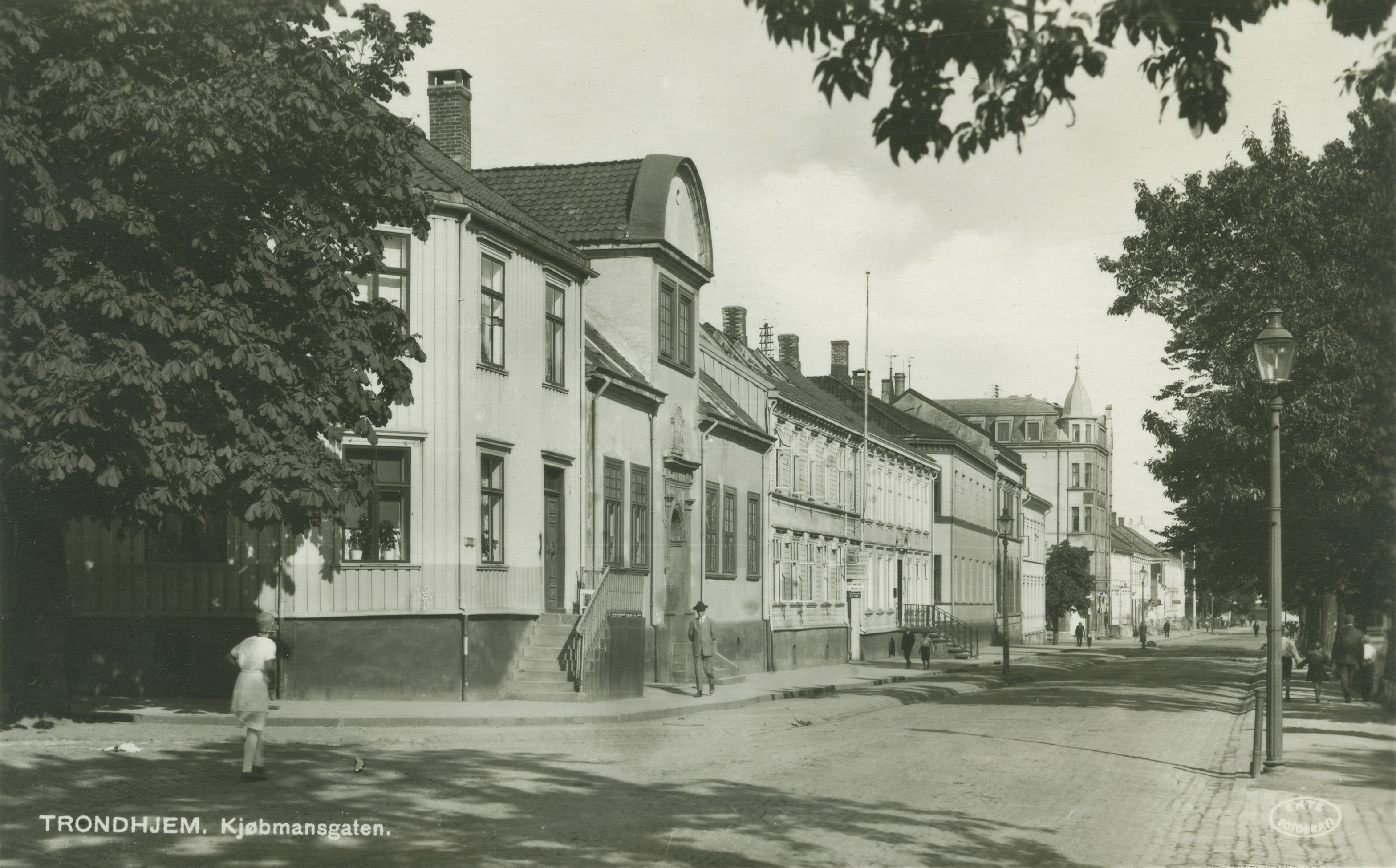 Gramgården i Kjøpmannsgaten 34. Senere flyttet til Sverresborg Trøndelag folkemuseum